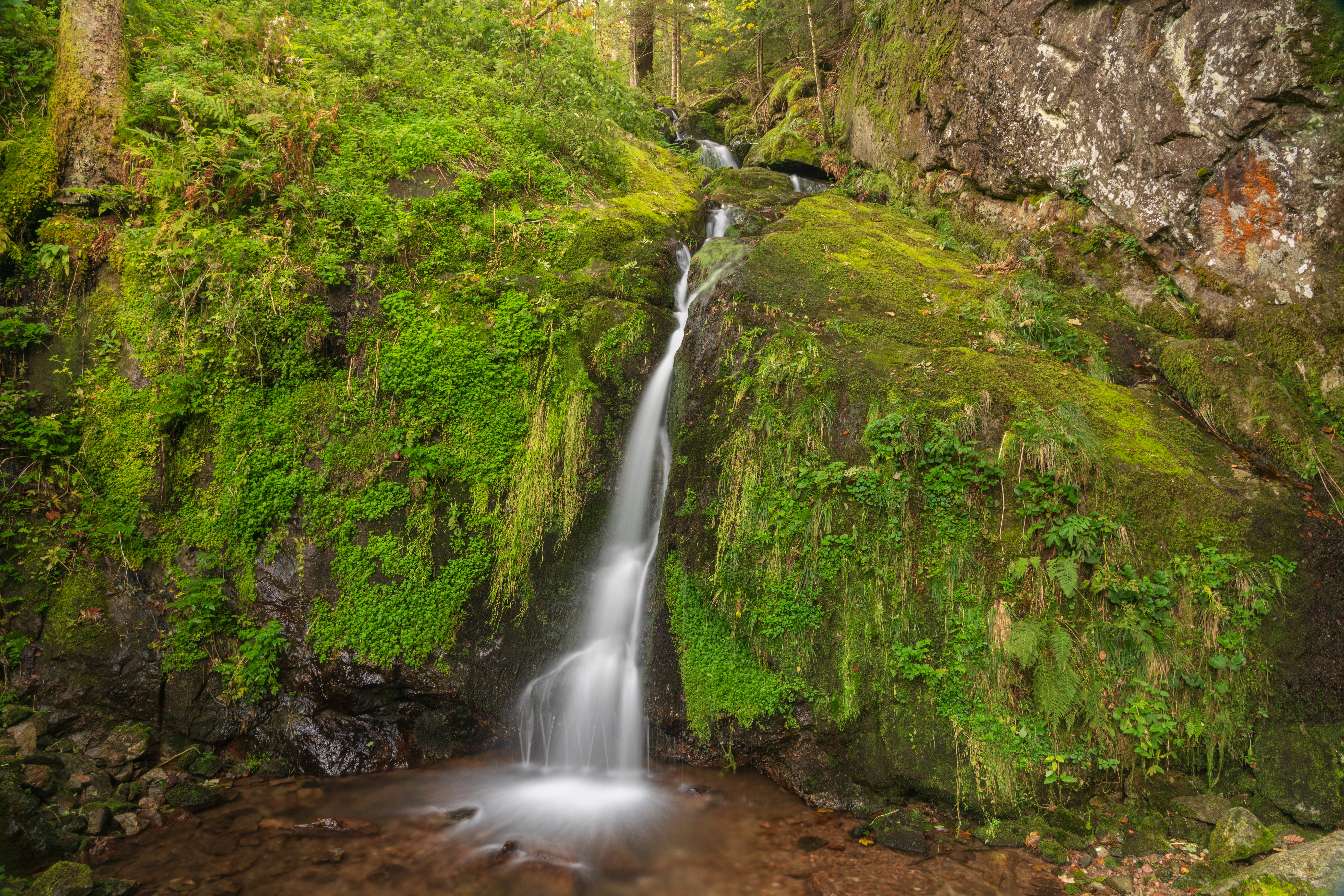 entlang dem Haslachsimonswälder Bach im Naturschutzgebiet Kostgefäll